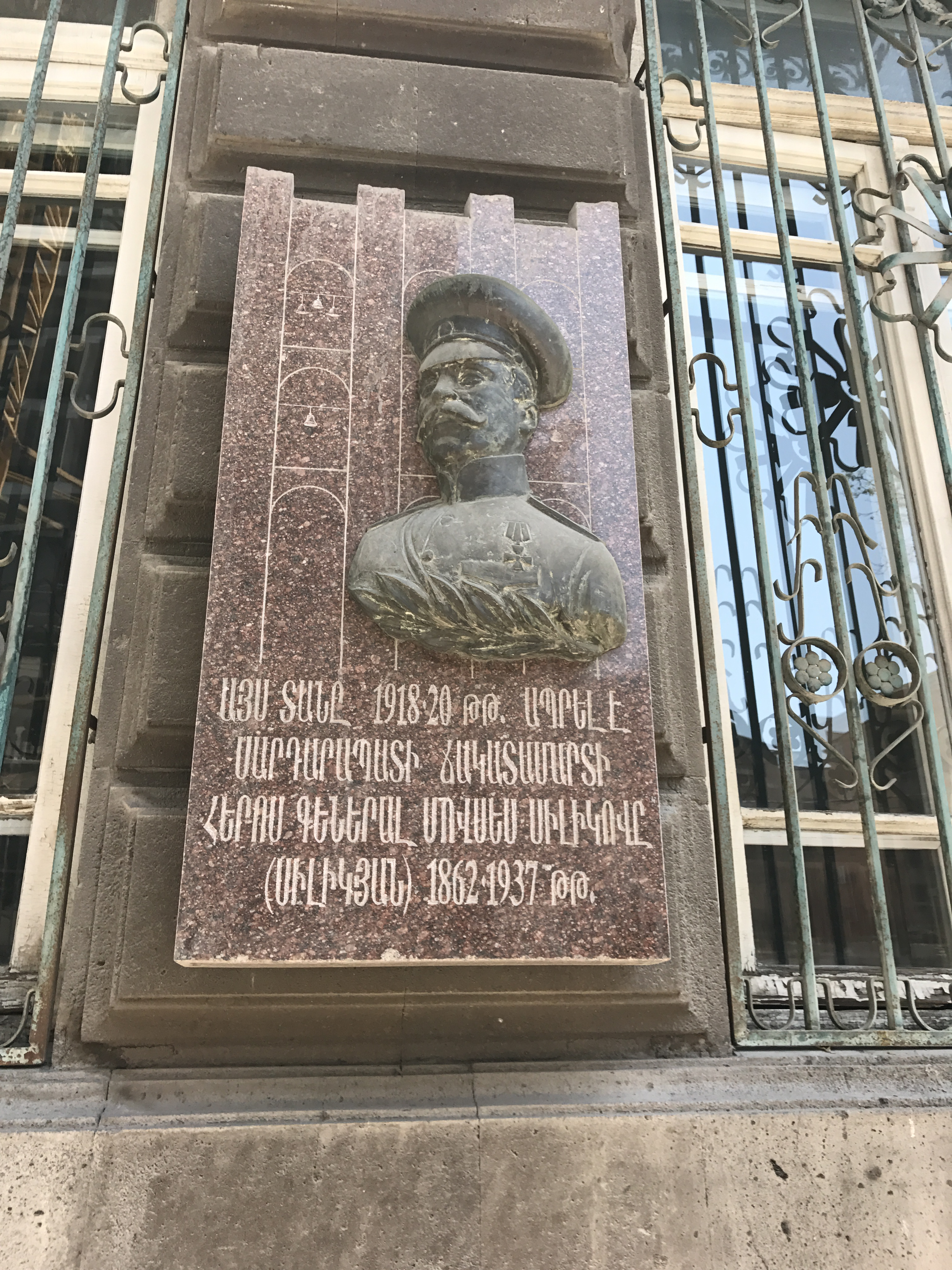 Image d'Erevan en juillet 2017. Sujet divers.